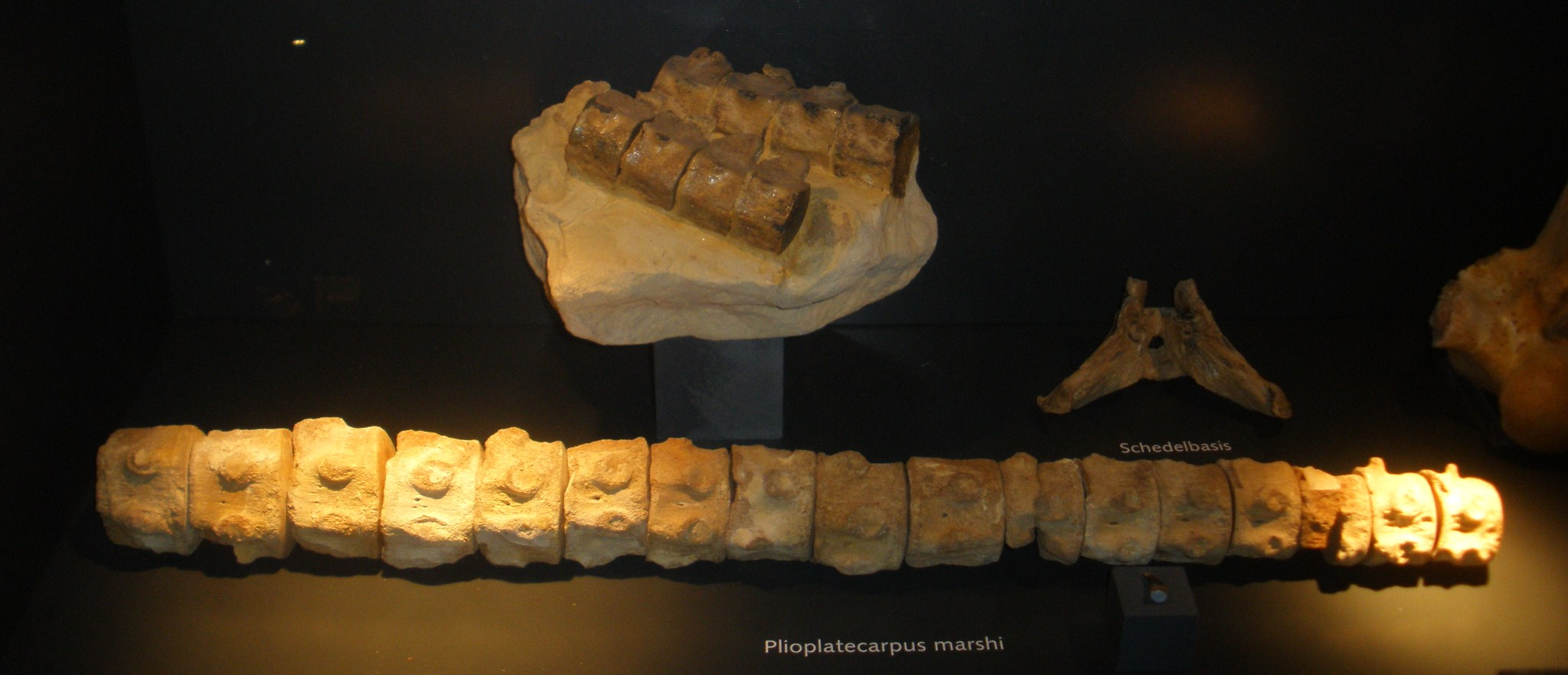 Fossil of Plioplatecarpus, an extinct mosasaur- Took the photo at Natural History Museum of Maastricht